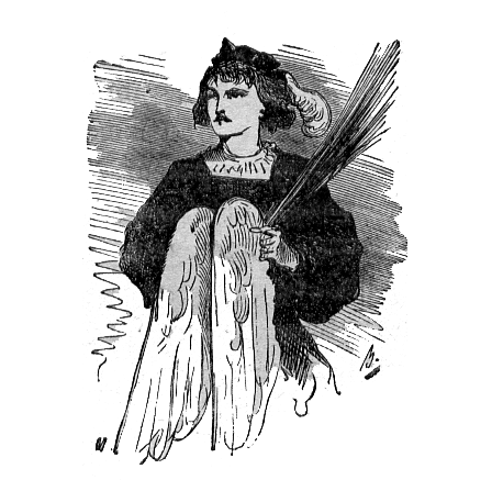 Pour la source voir : Discuter:Contes d'Andersen Vignettes de Bertall illustrant le conte Le Compagnon de voyage : le compagnon, les ailes du cygne et les verges.